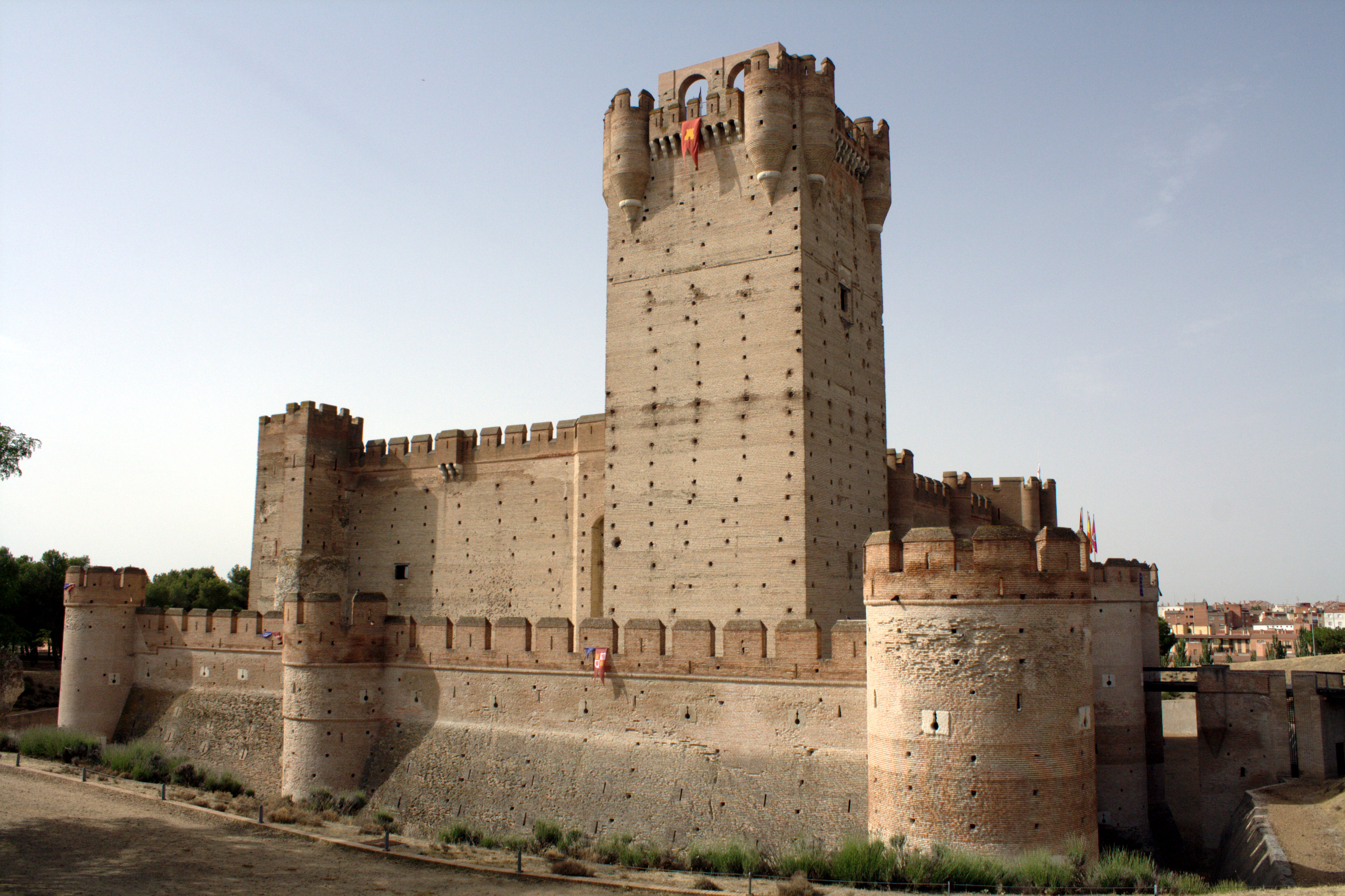 Torre del homenaje y muralla del Castillo de la Mota, en Medina del Campo